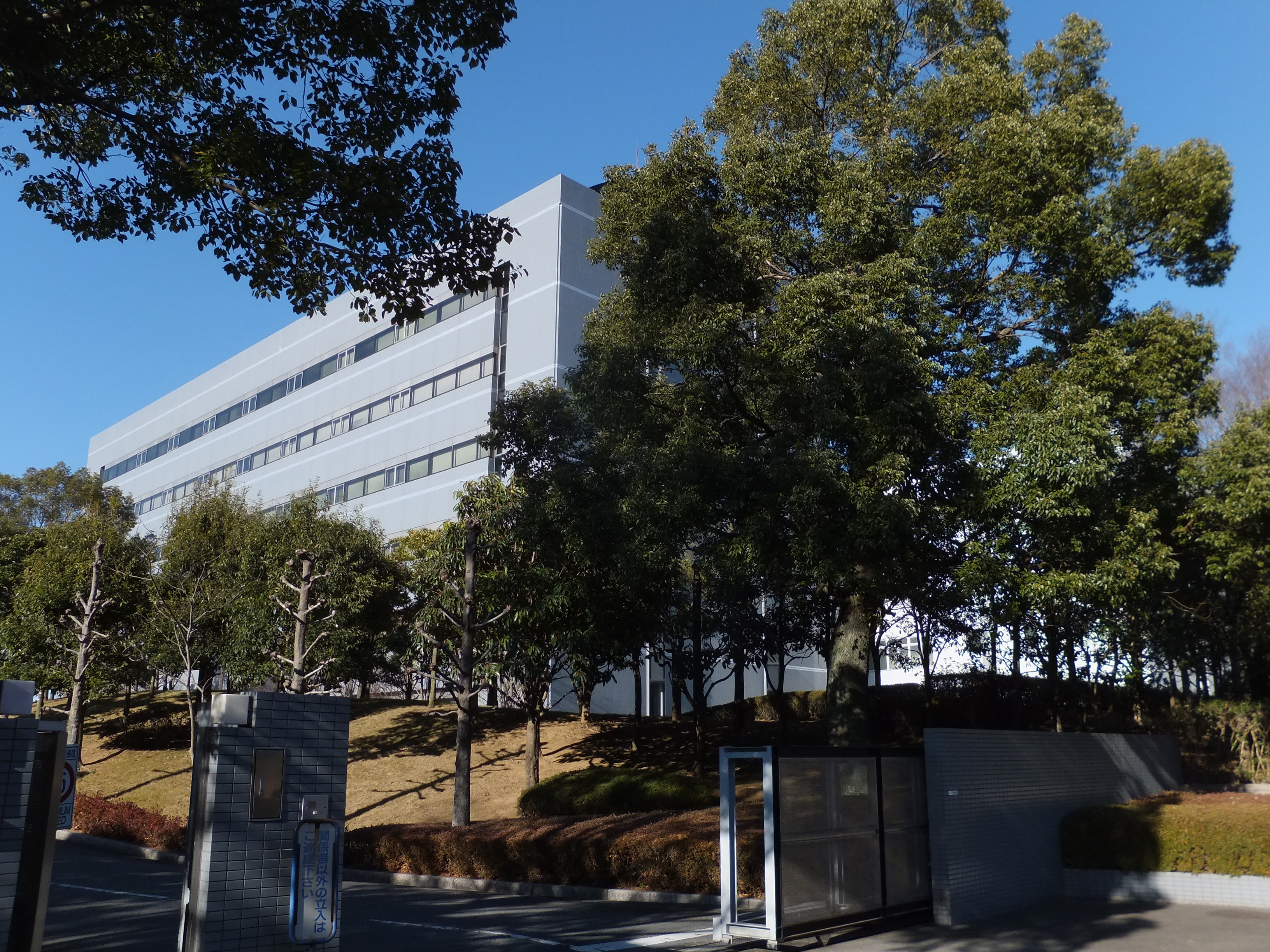 ハウス食品開発研究所（ソマテックセンター。千葉県四街道市）